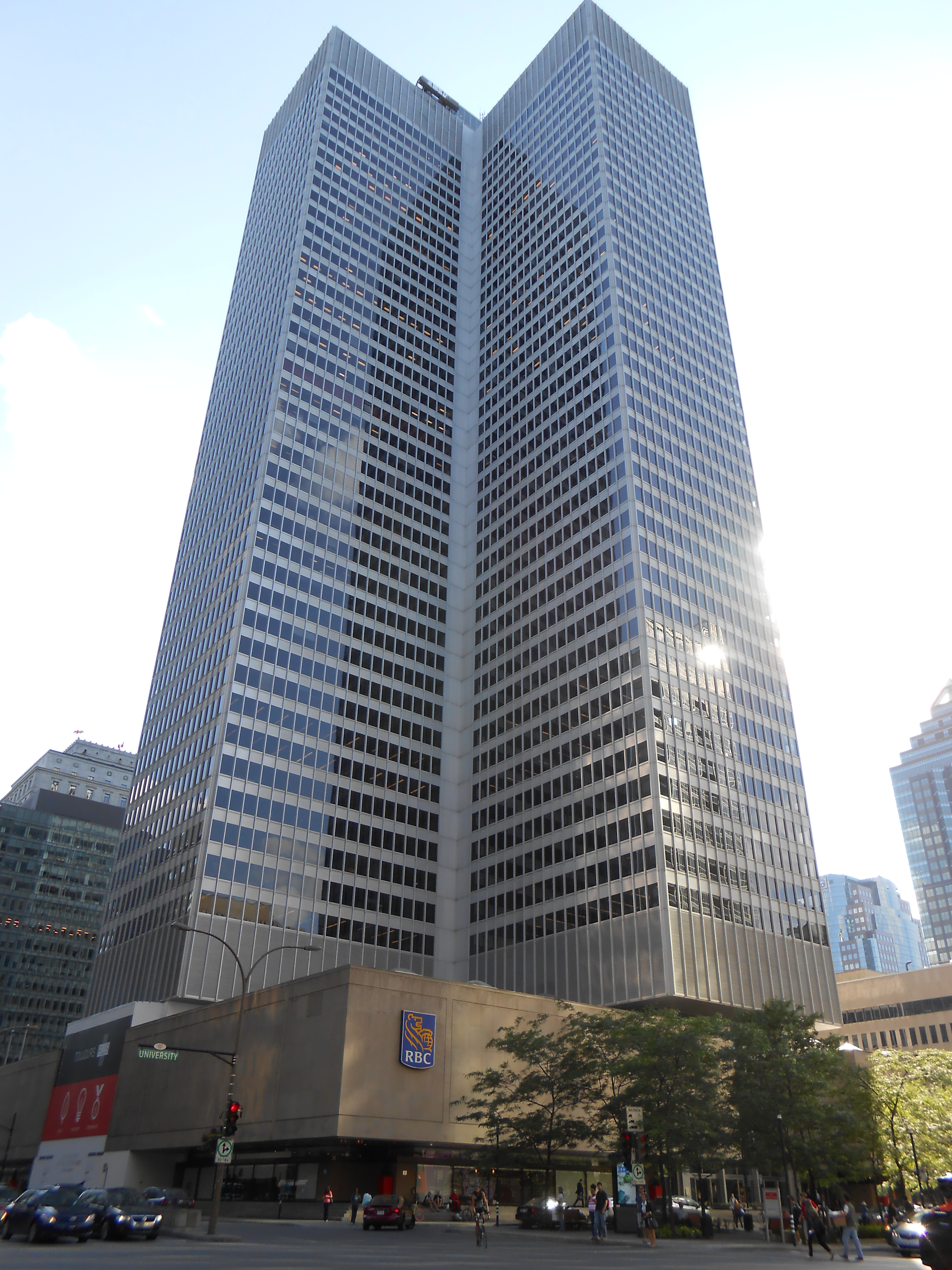 Place Ville Marie, Montréal